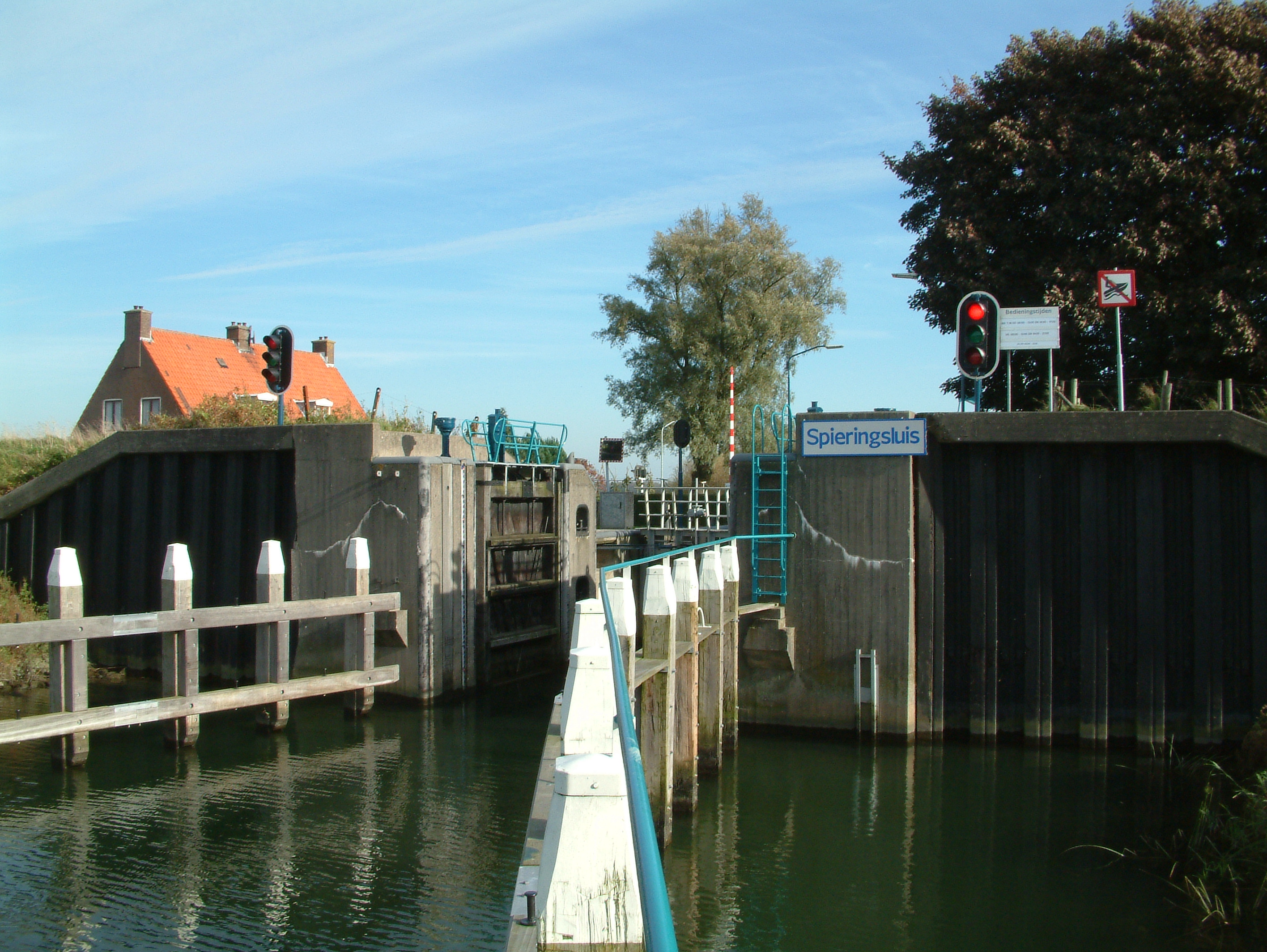 Spieringsluis tussen de Nieuwe Merwede en de Brabantse Biesbosch